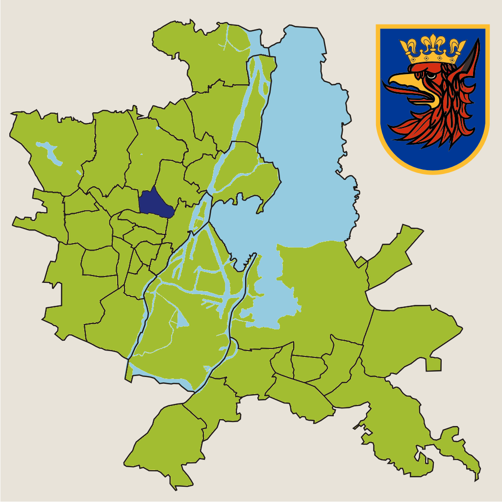 Osiedle "Niebuszewo" w Szczecinie – jednostka pomocnicza miasta w 2010